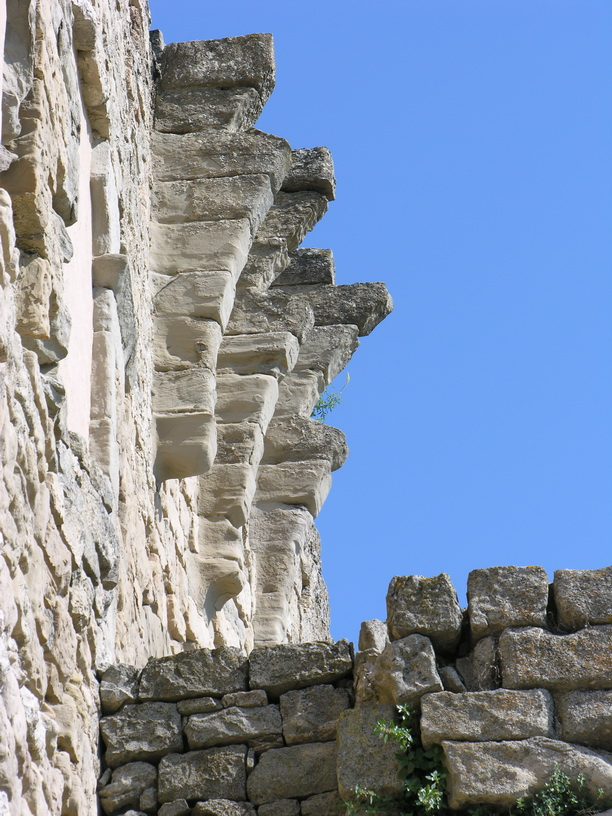 Castell de Boixadors, a Sant Pere Sallavinera (Anoia). Arrencament dels arcs diafragmàtics conservats a ponent de la torre de llevant del castell.